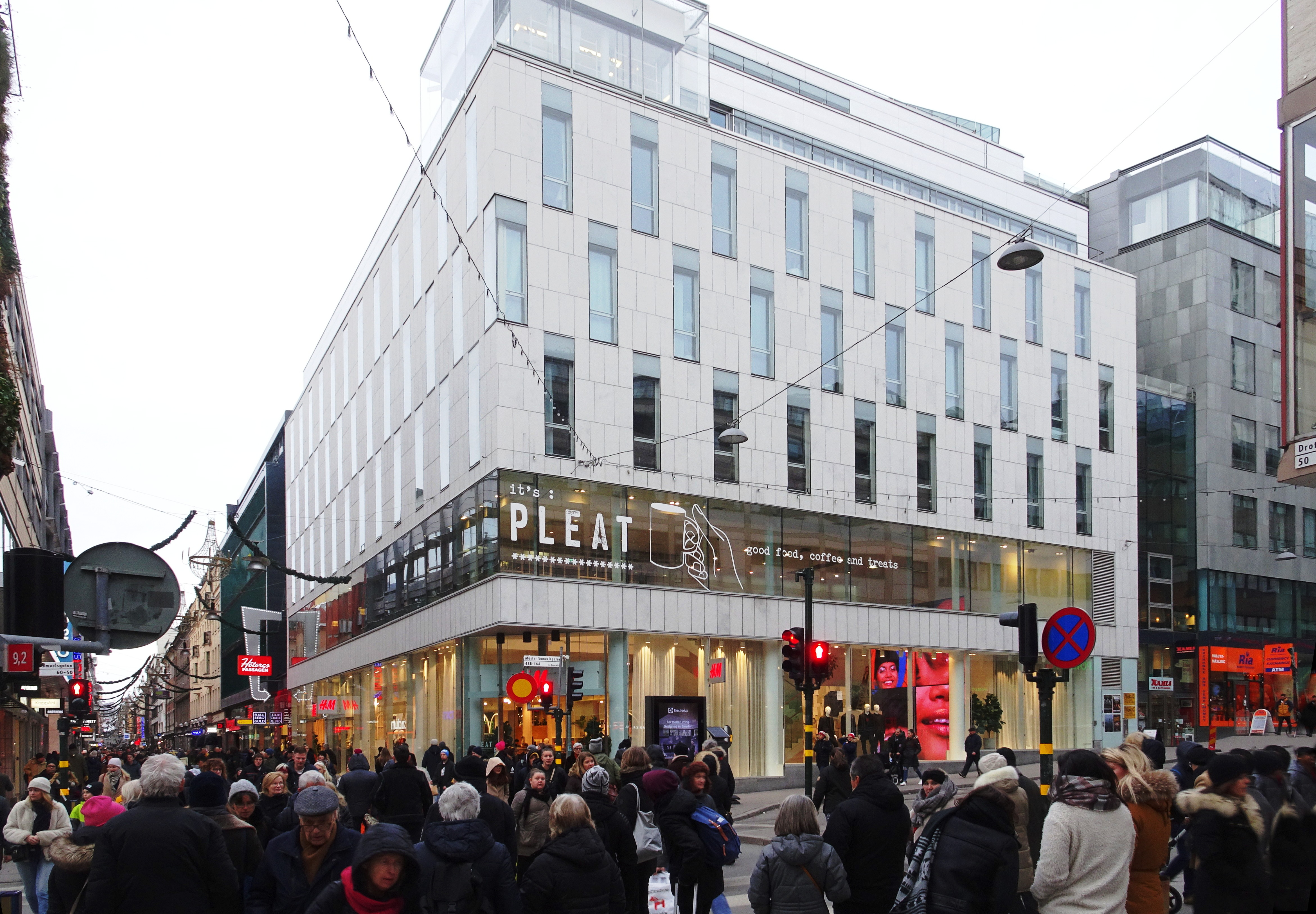 Drottninggatan, Mäster Samuelsgatan, byggår 2005-2008, Reflex arkitekter